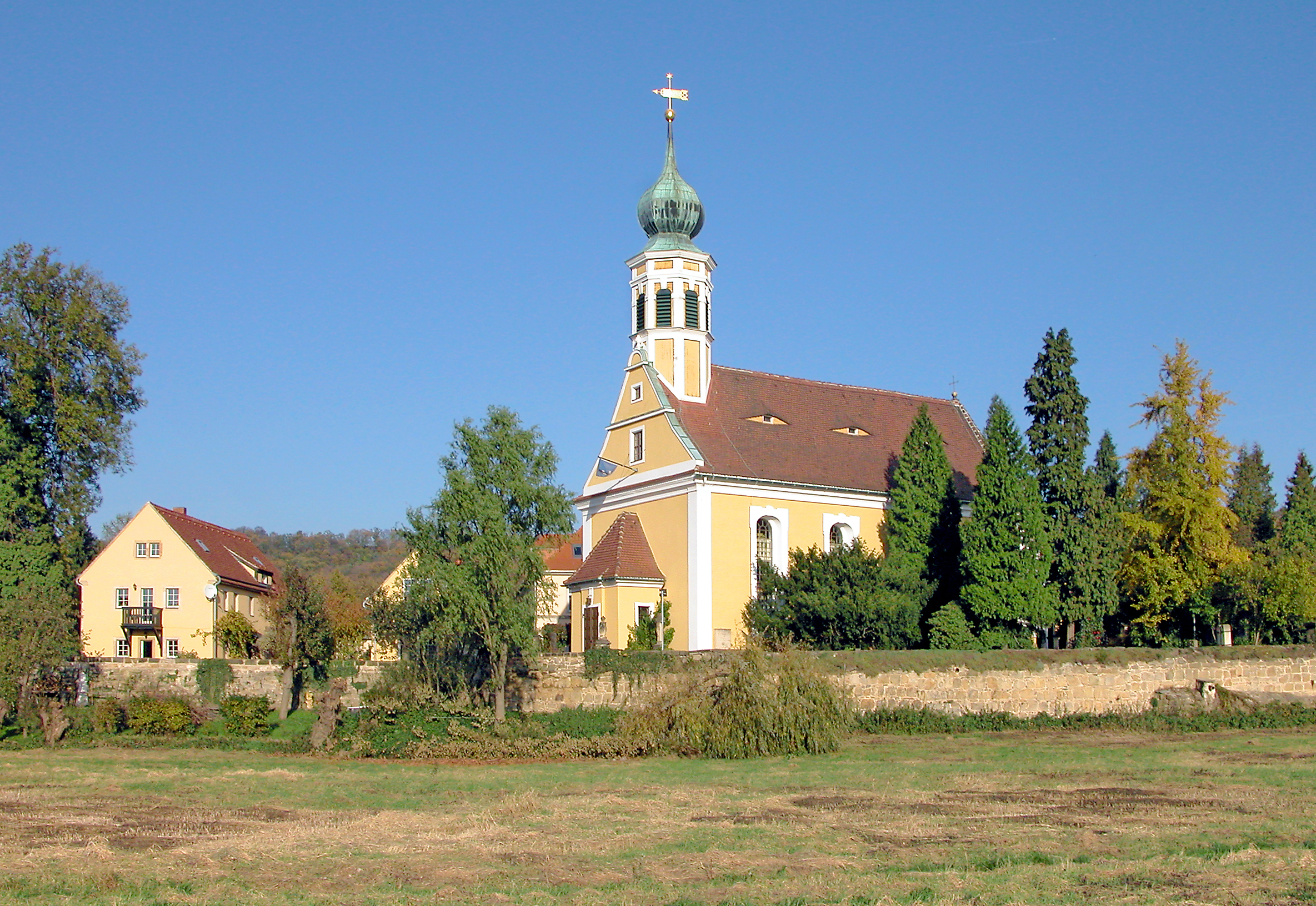 08.11.2006 01326 Dresden-Hosterwitz, Kirchgasse (GMP: 51.014793,13.856790): Schifferkirche "Maria am Wasser". Vorgängerbauten sind bis ins 13. Jahrhundert nachgewiesen. 1774 erhielt die Kirche ihre heutige Gestalt. Sicht vom Elbufer von Süden. [DSCN12566.TIF]20061108120DR.JPG(c)Blobelt